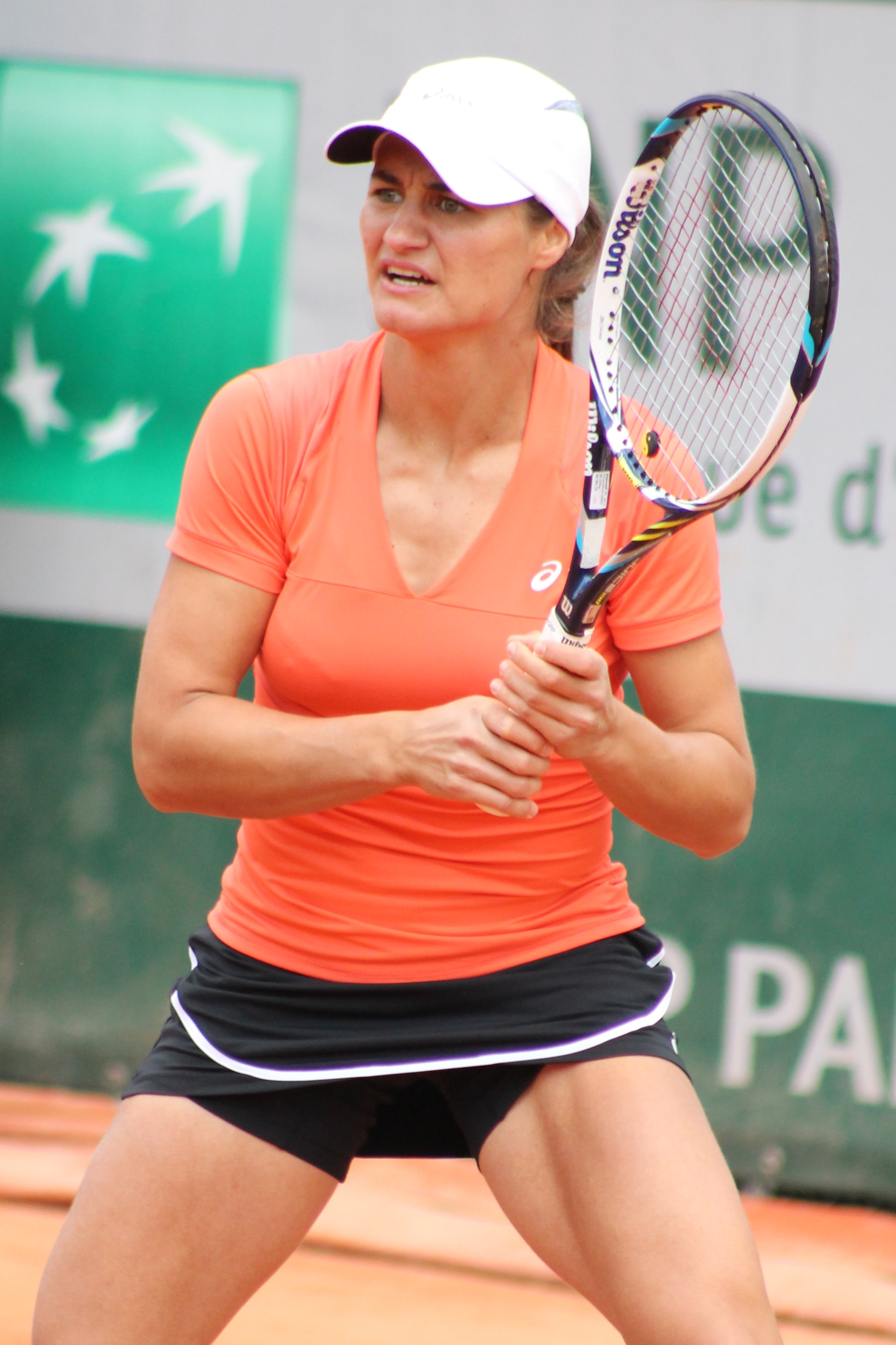 Niculescu RG15 (3)